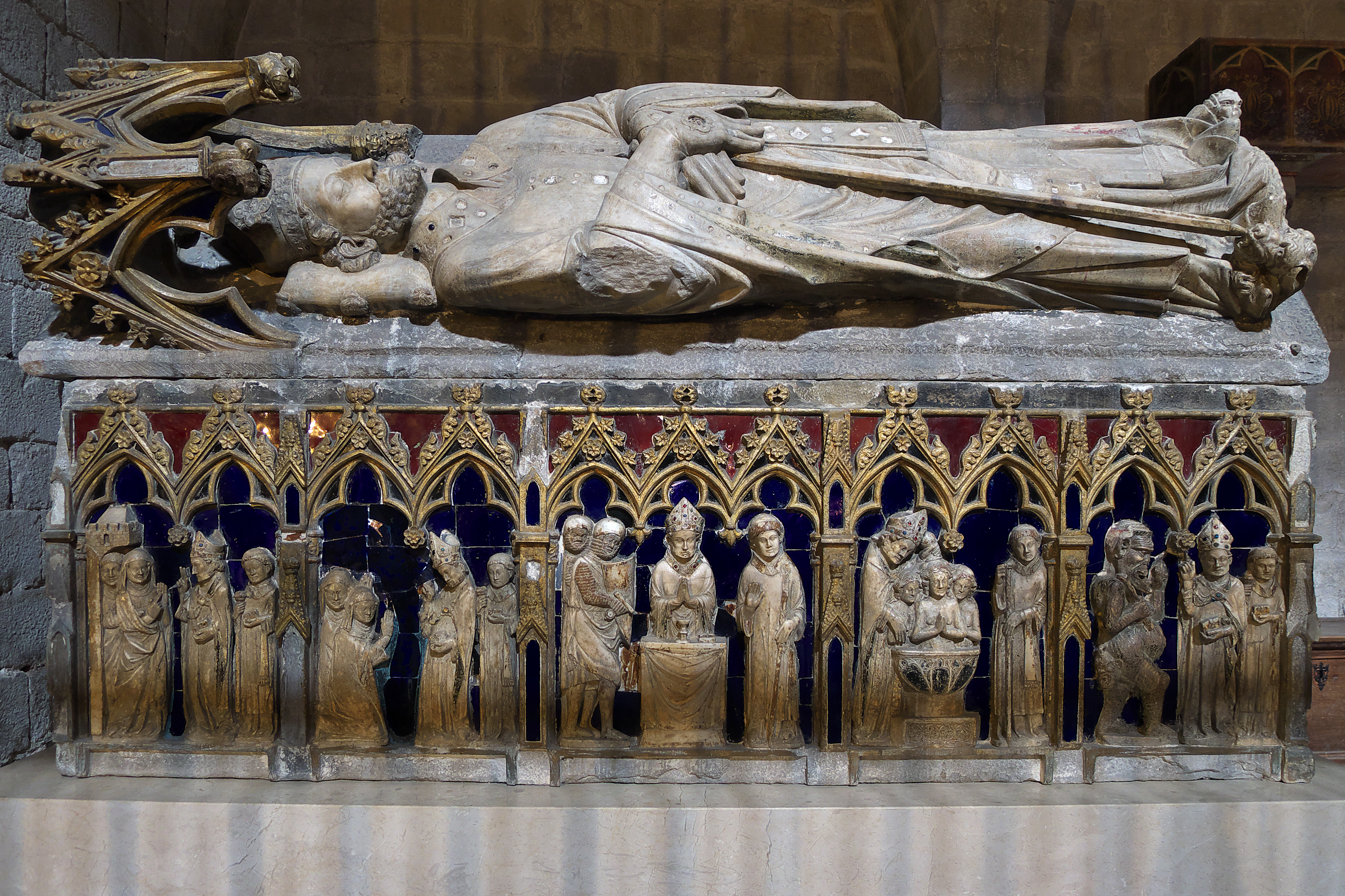 Una de las más valiosas esculturas góticas de Gerona. Segundo sepulcro del obispo y mártir San Narciso, patrón de la ciudad. El canónigo Guillermo Socarrats consigue la intervención del flamenco, afincado en Gerona, Joan de Tournai (1328) para la realización del magnífico sepulcro en alabastro.